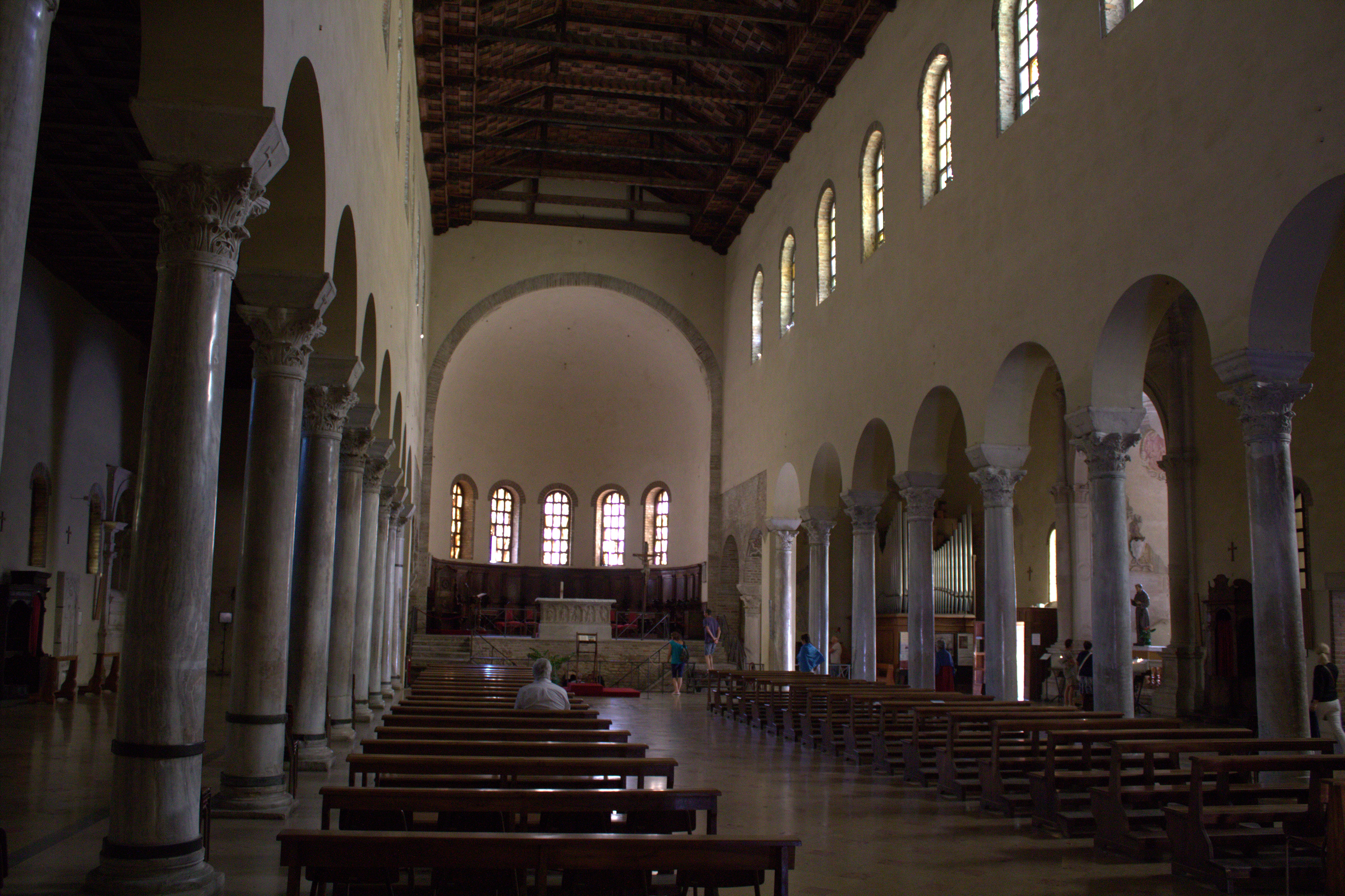 Interno della basilica di San Francesco, Ravenna